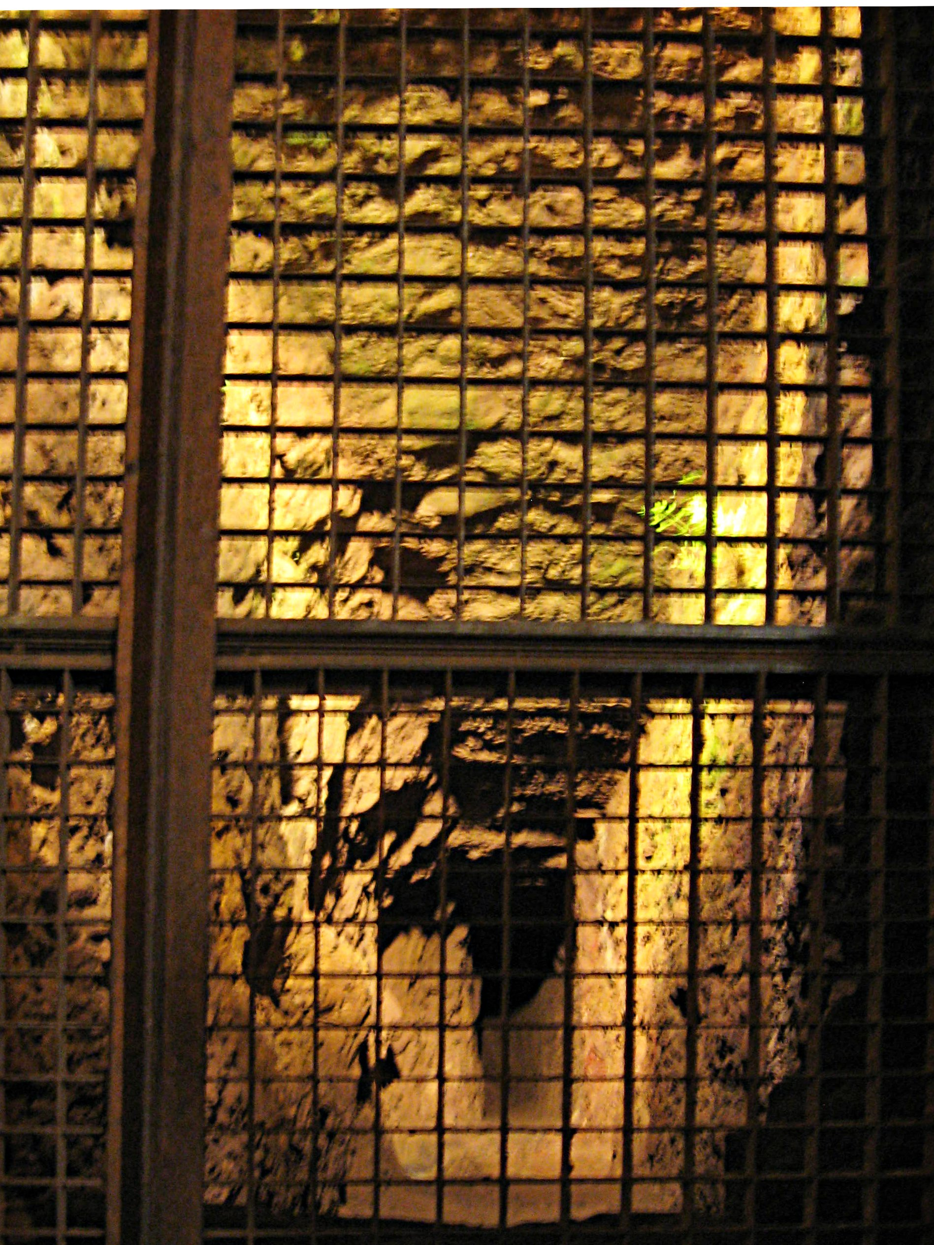 Sturzschacht im Erzbergwerk in St.-Anna-Stollen